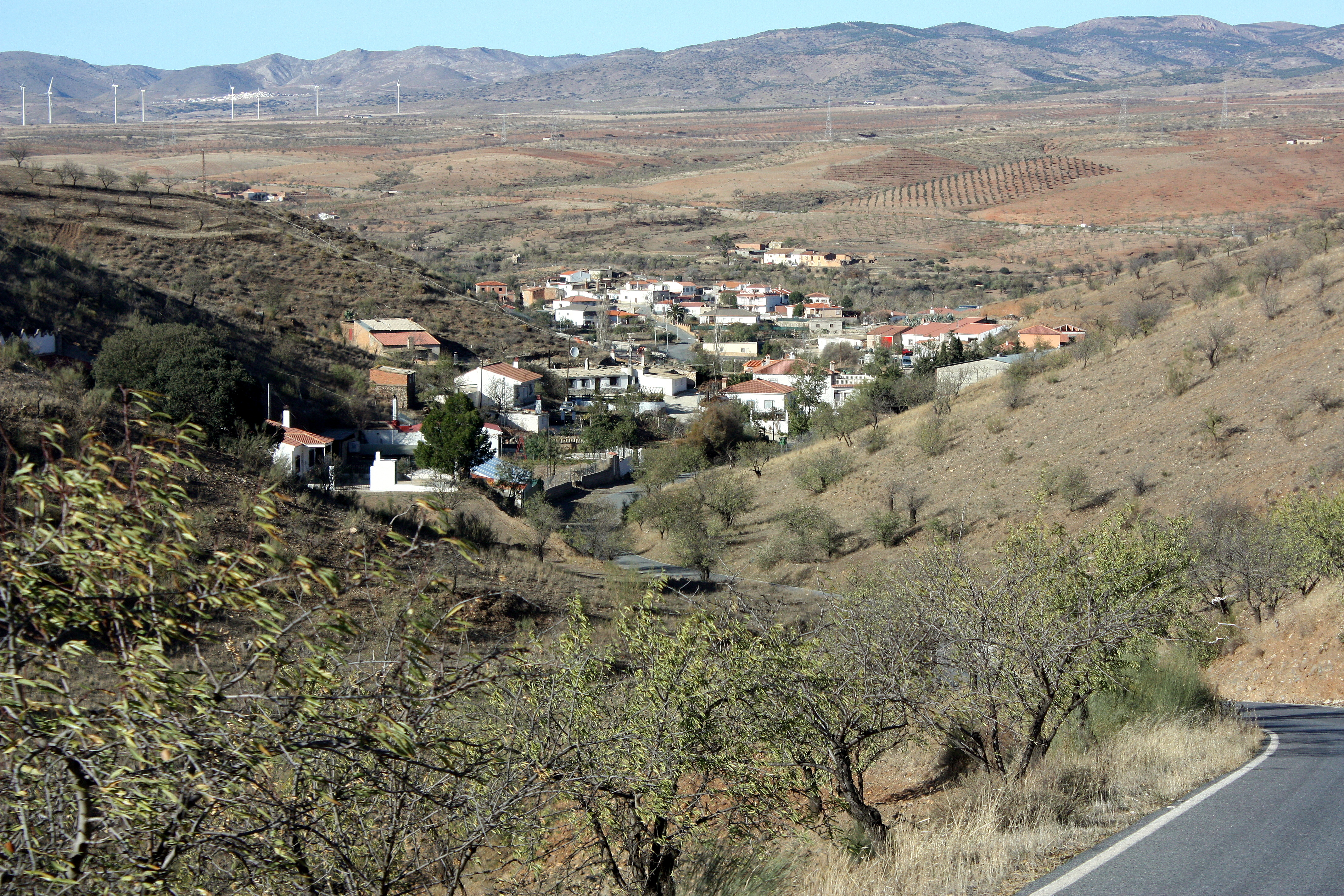 Vista general de La Huertezuela en la que se puede distinguir los molinos de viento al fondo